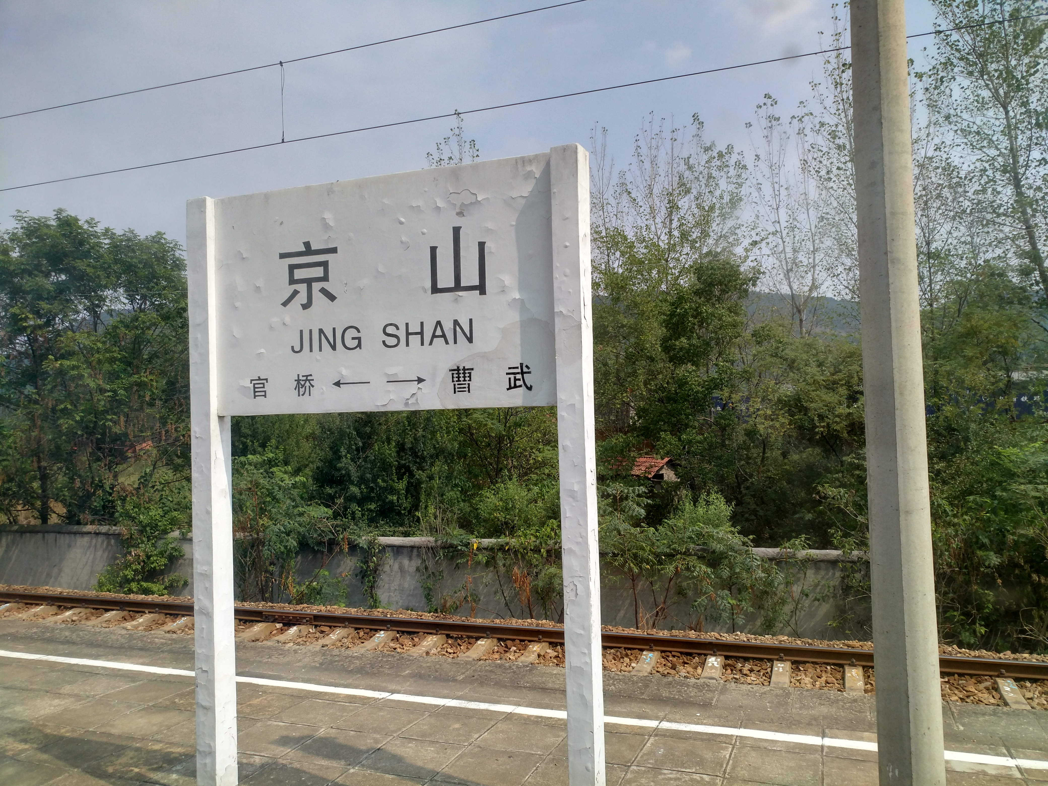 京山站